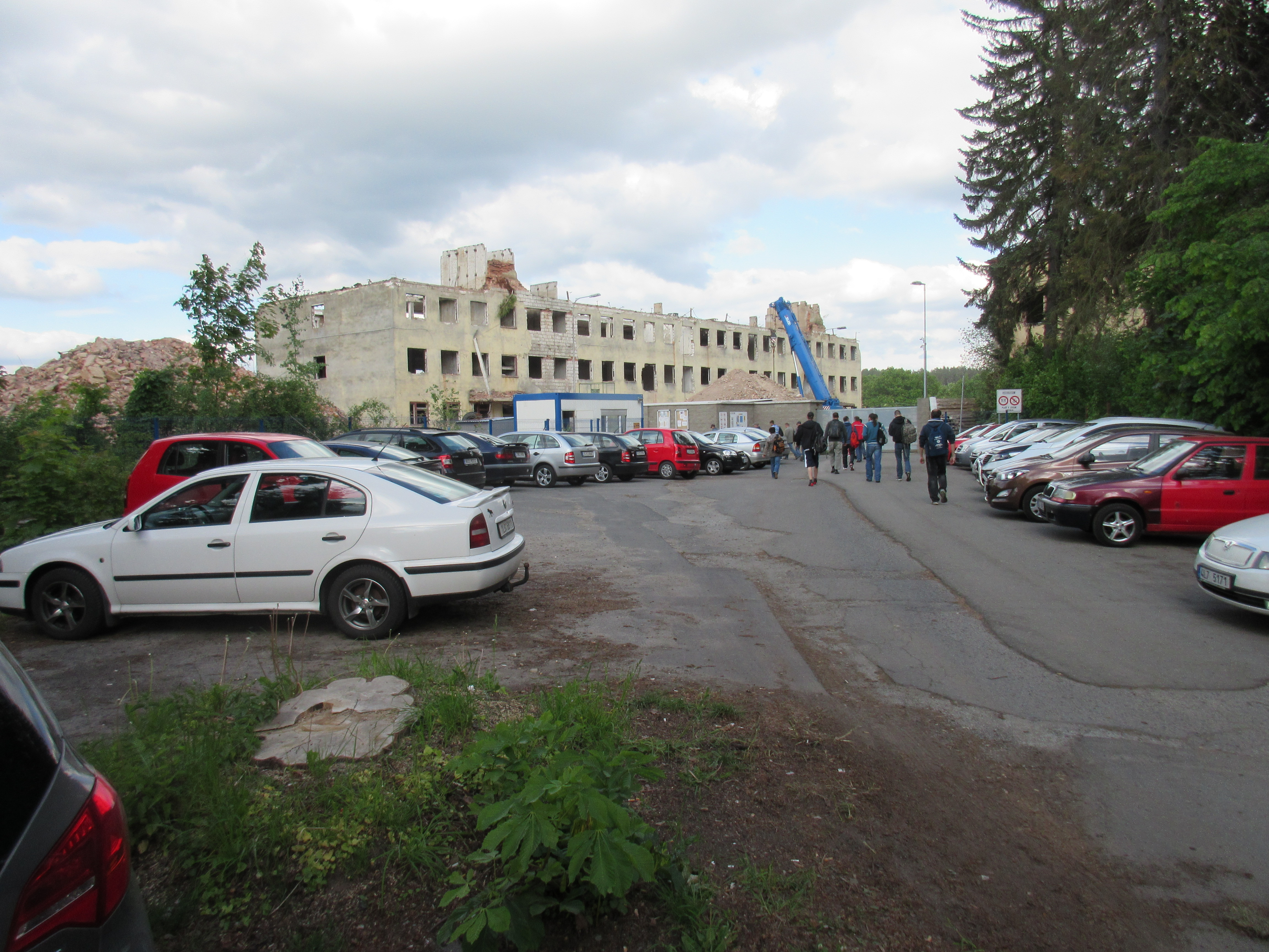 Bourání starých budov v areálu továrny IAC